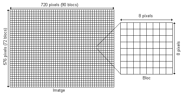 Bloques